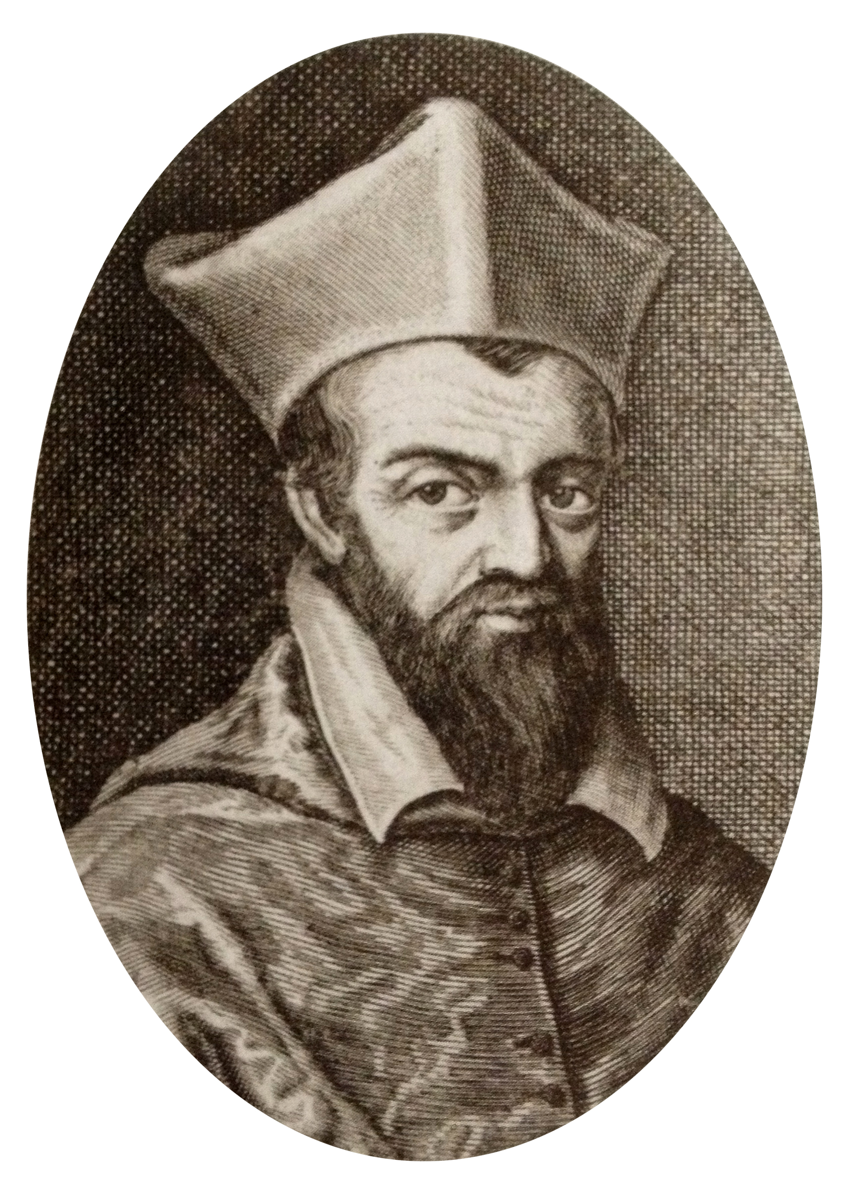 François de Joyeuse, archevêque de Rouen (1605-1615).